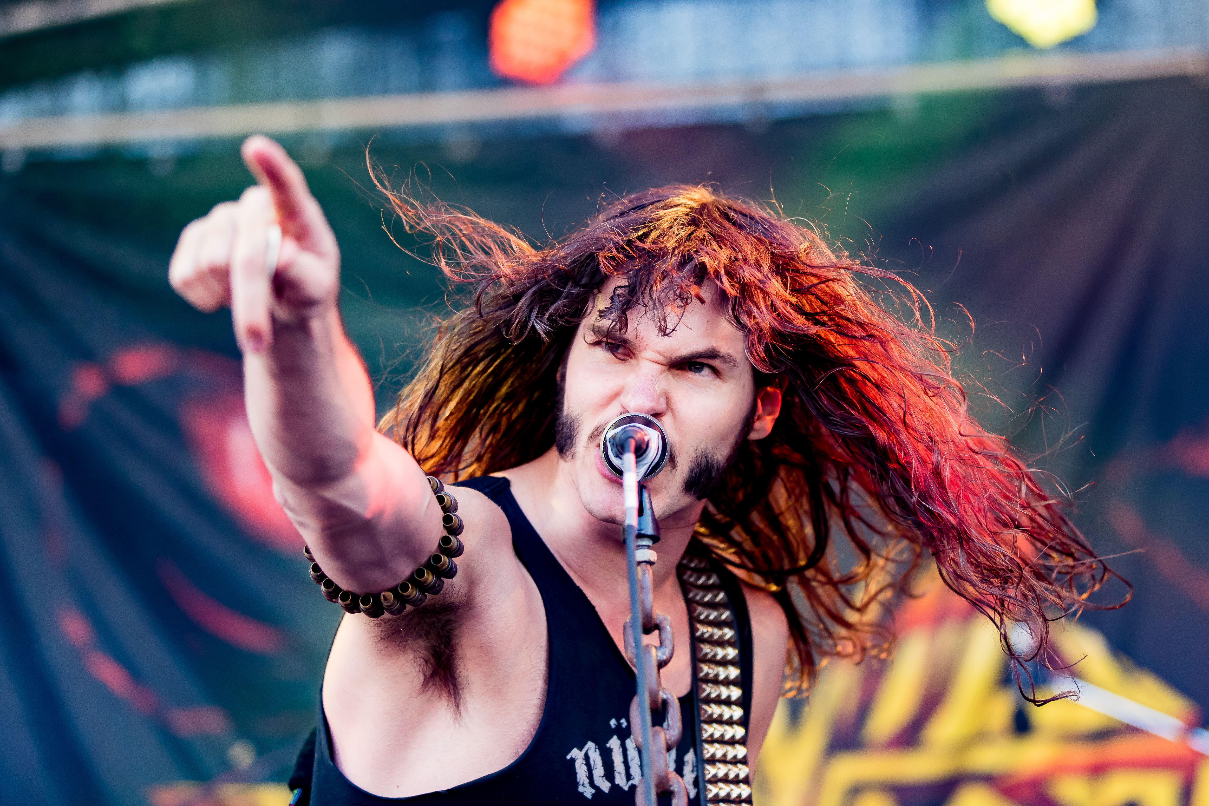 Evil Invaders during Summer Breeze 2016 at , Dinkelsbühl, Bayern, Germany on 2016-08-17, Photo: Sven Mandel